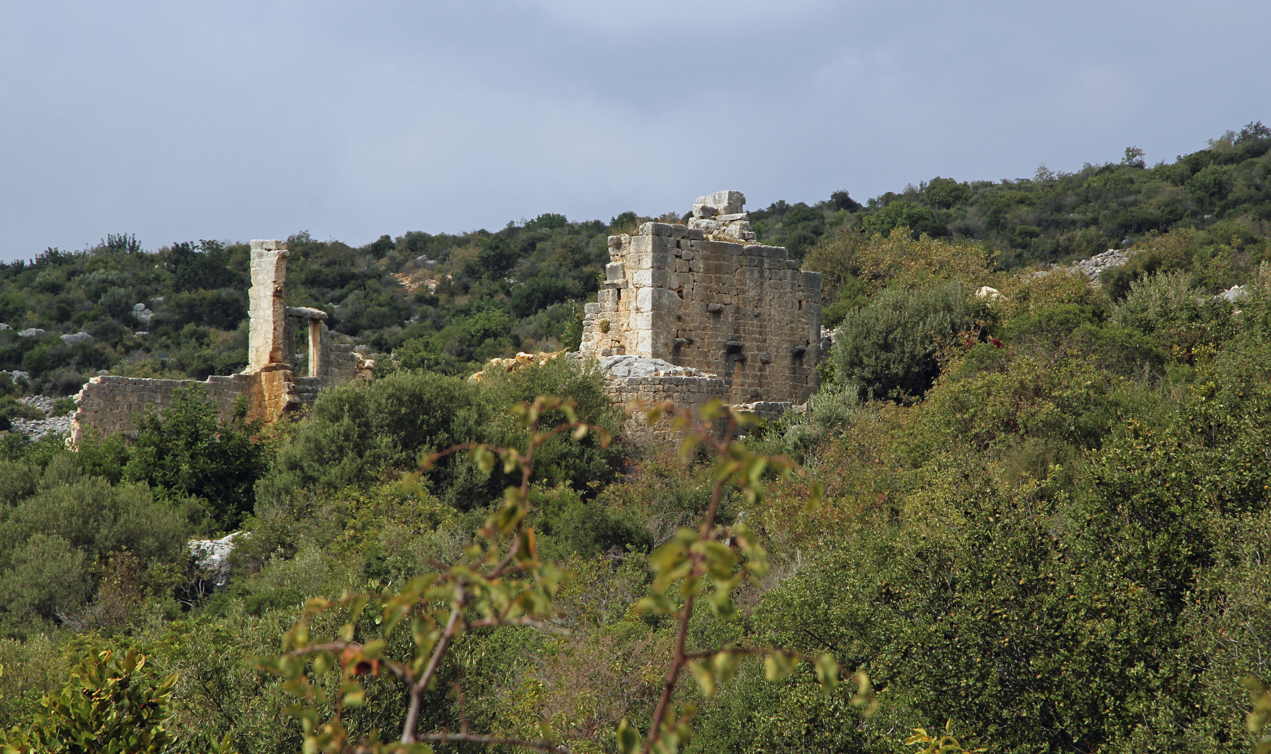 Çatıören, römische Siedlung nahe Kızkalesi, Südtürkei, Basilika